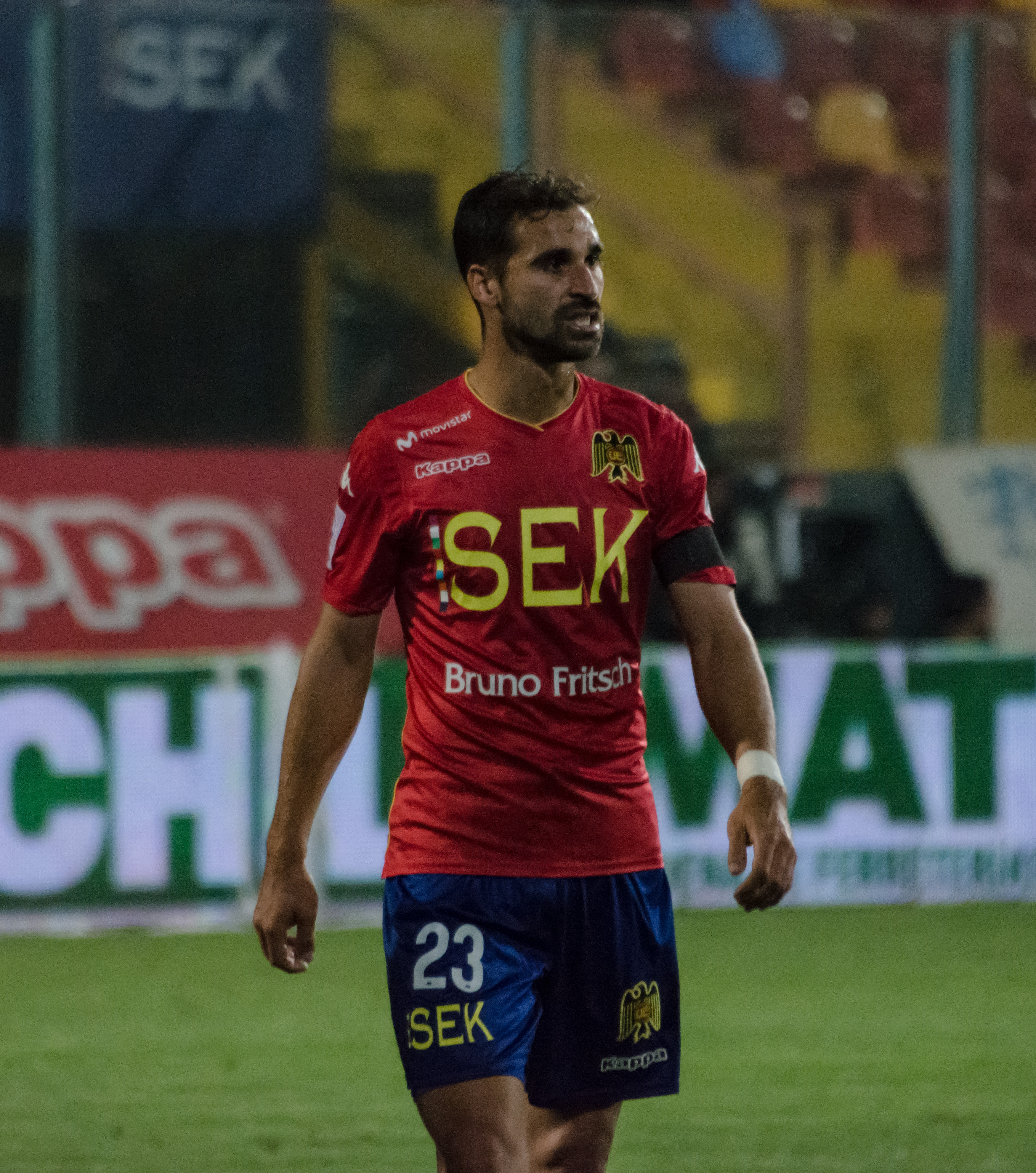 Sebastián Jaime, Unión Española v Curicó Unido, Estadio Santa Laura, Independencia, Santiago, Chile